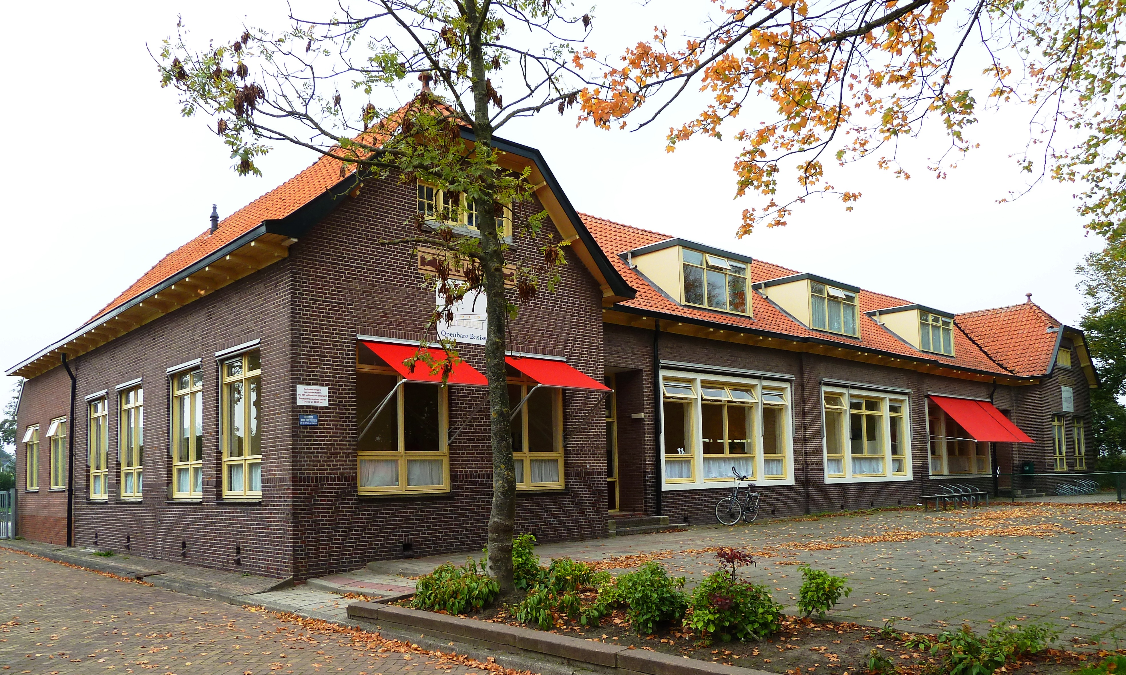 Lagere school van Oldehove (Groningen, Nederland). Hierin was vroeger ook de ULO gevestigd. Het gebouw werd ergens begin 20e eeuw gebouwd. De ULO werd later een VBO, in 1985 onderdeel van scholengemeenschap Hughemarke, begin jaren 1990 van scholengemeenschap en waarschijnlijk ergens tussen 1997 en 1999 gesloten.